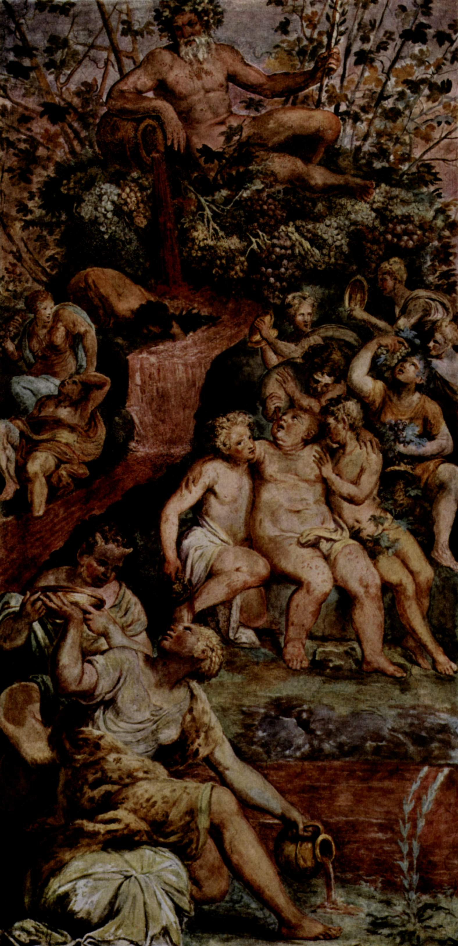 detail